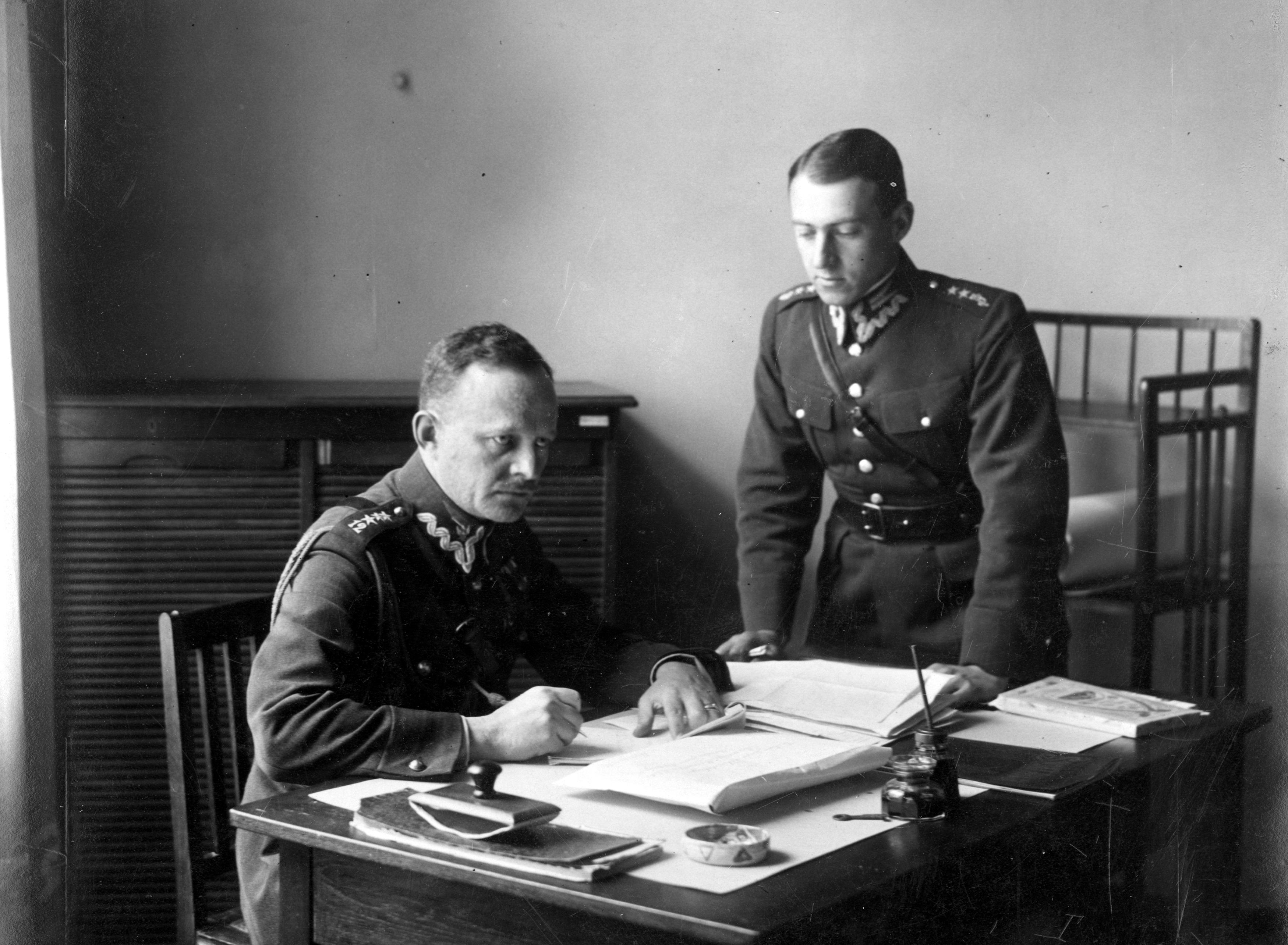 Major Adam Remigiusz Grocholski i por. Alfons Vacqueret jako adiutancji ministra spraw wojskowych Józefa Piłsudskiego (ok. 1926-1936).